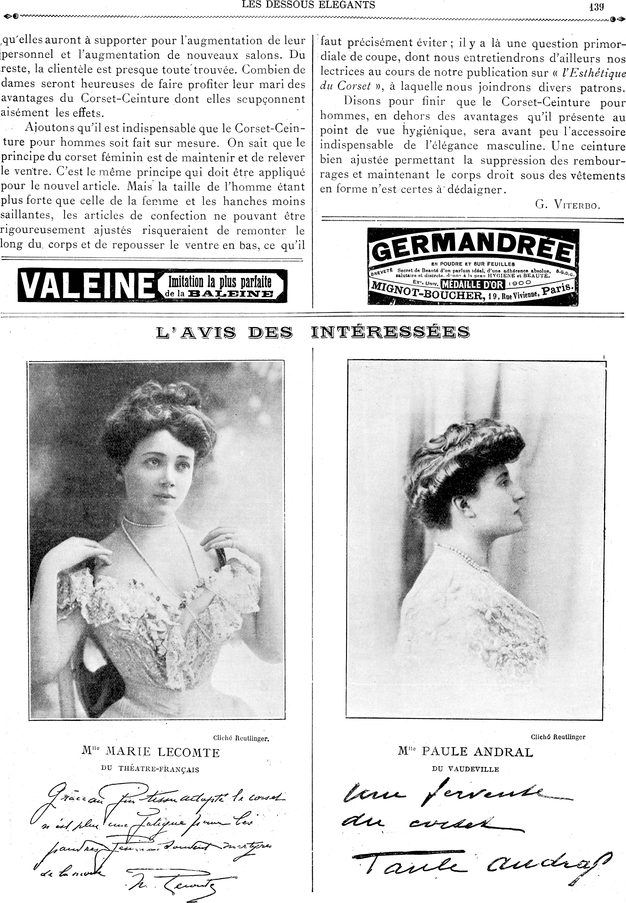 Marie Lecomte et Paule Andral.